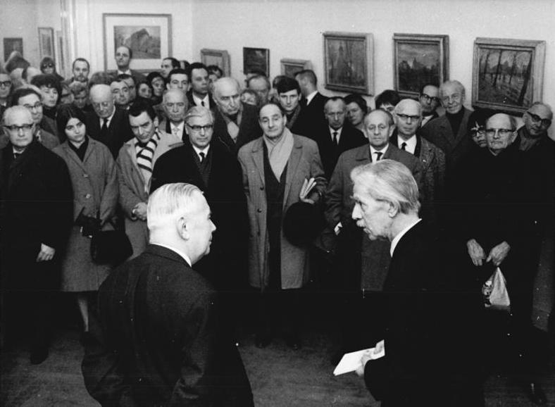 Berlin, Otto Nagel-Ausstellung, Ihering Zentralbild ZB 24.3.1966 "Berliner Bilder", eine Sammlung, in der ausschließlich Altberliner Motive aus der Schaffenszeit Prof. Otto Nagels von 1933 bis 1965 gezeigt werden, wurde am 23.3.1966 in der Westberliner Ladengalerie eröffnet. In kurzen Einführungsworten berichtete der Vizepräsident der Deutschen Akademie der Künste, Prof. Otto Nagel (rechts), wie es dazu kan, daß er nach 1933 begann, Altberliner Motive zu malen. Der Theaterkritiker Herbert Ihering (links) würdigte in seiner Ansprache vor rund 100 Teilnehmern das künstlerische Werk Otto Nagels. Abgebildete Personen: Nagel, Otto Prof.: Maler, Präsident der Akademie der Künste (AdK), Nationalpreisträger, Vaterländischer Verdienstorden (VVO) in Gold, DDR (GND 118586300) Ihering, Herbert: Theaterkritiker, DDR (GND 118708627)